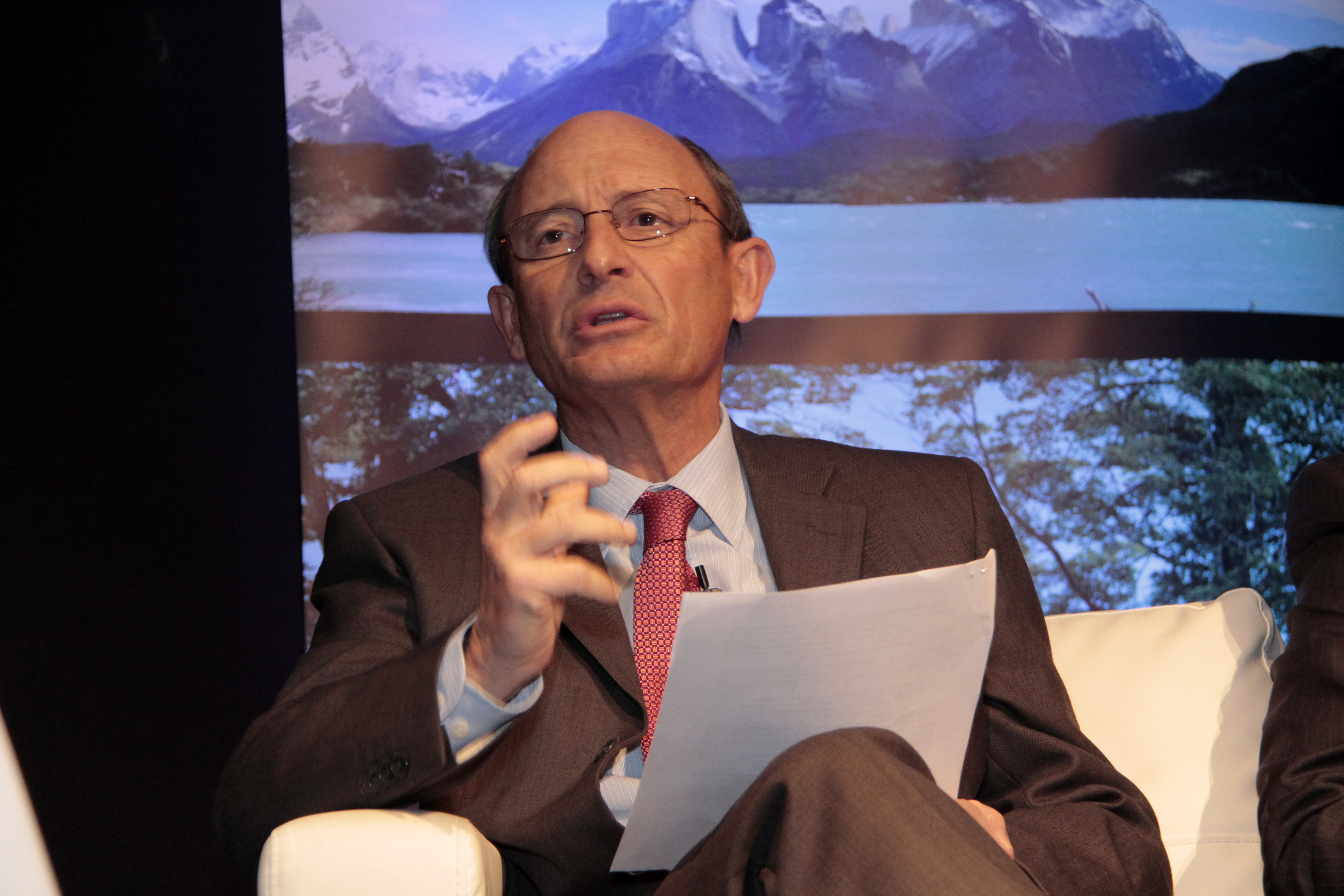 Juan Emilio Cheyre, en 2012.